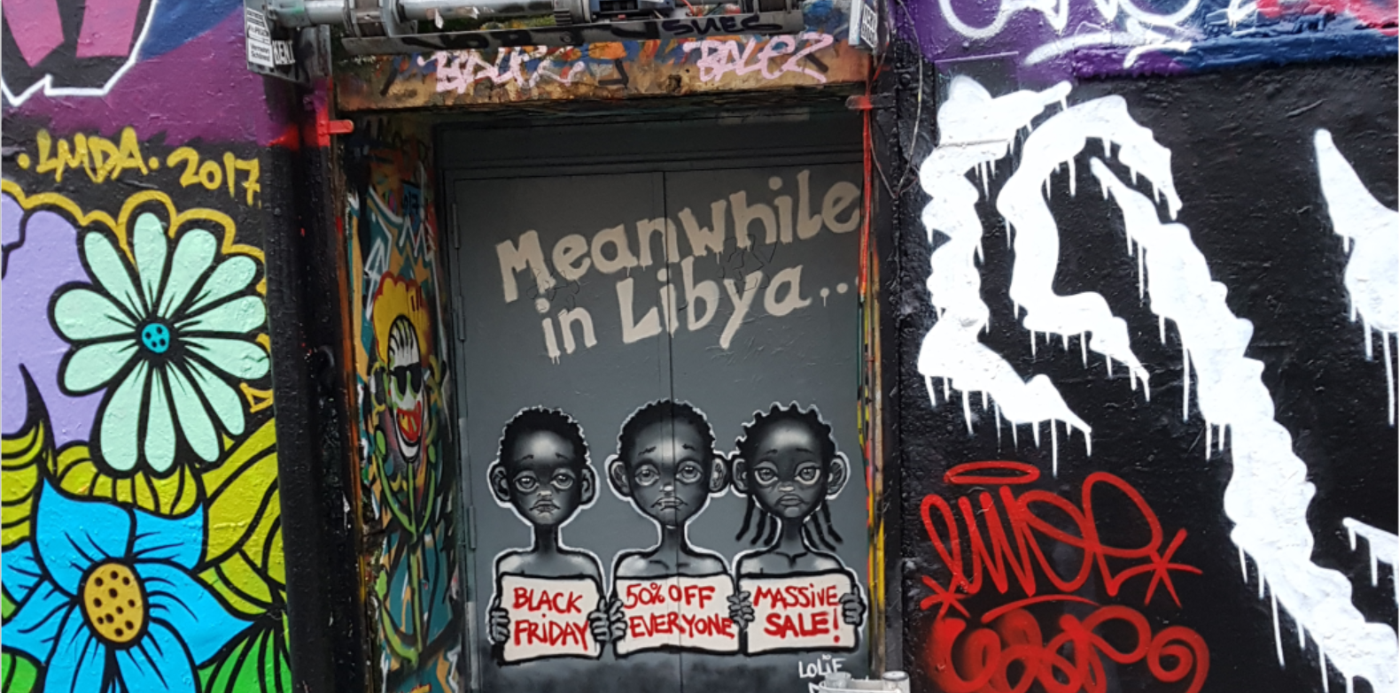 Graffiti rue Dénoyez